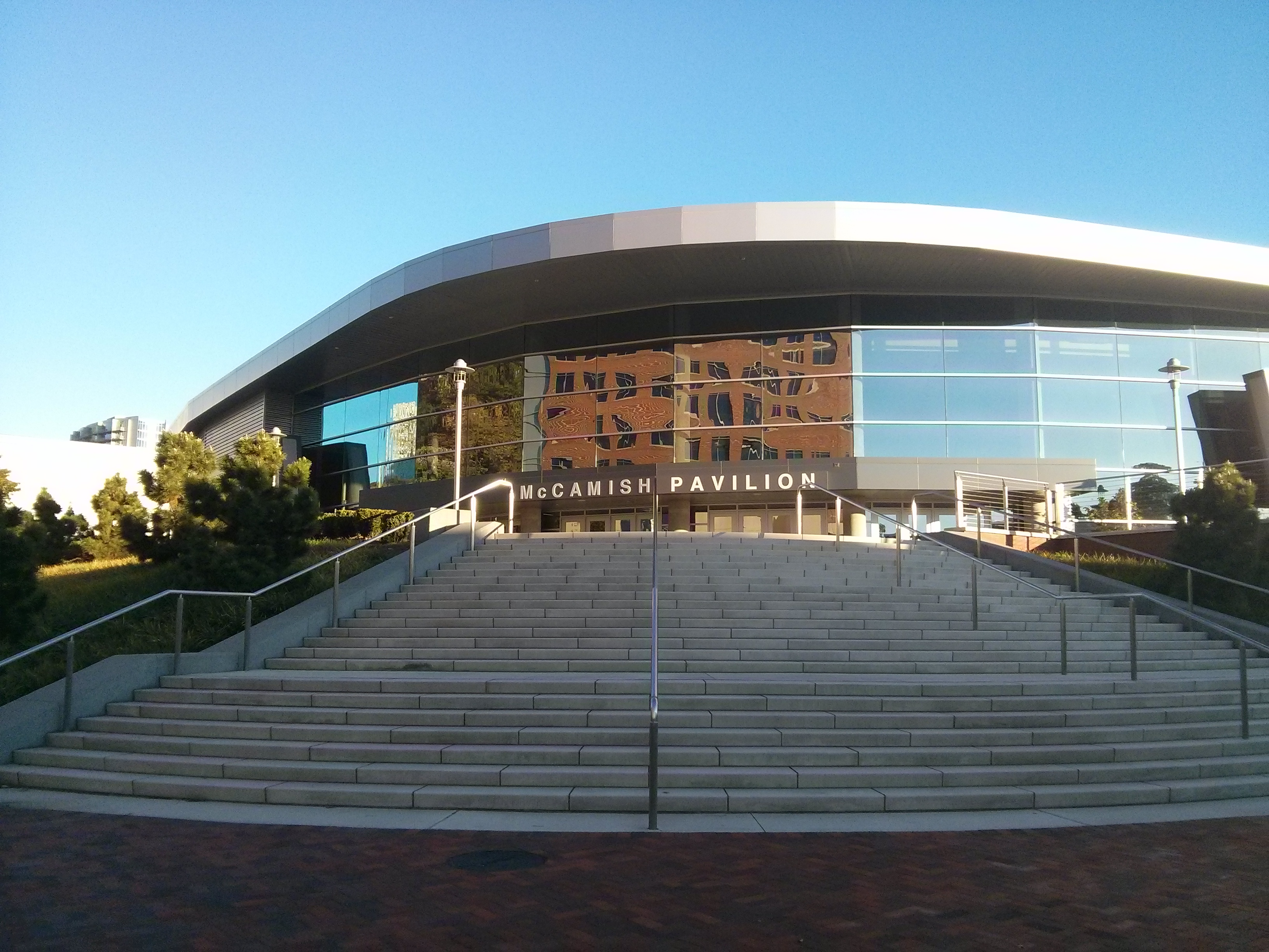 North entrance. Taken in 2014.